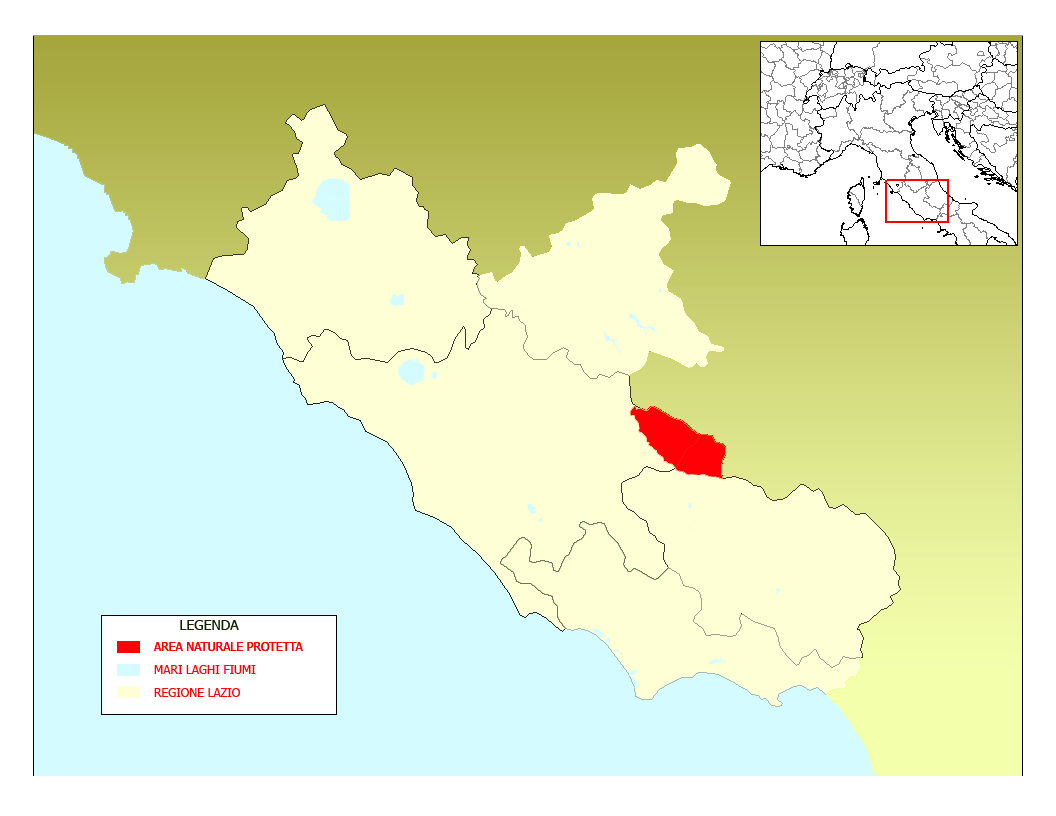 Mappa del parco regionale dei Monti Simbruini, Lazio, Italia